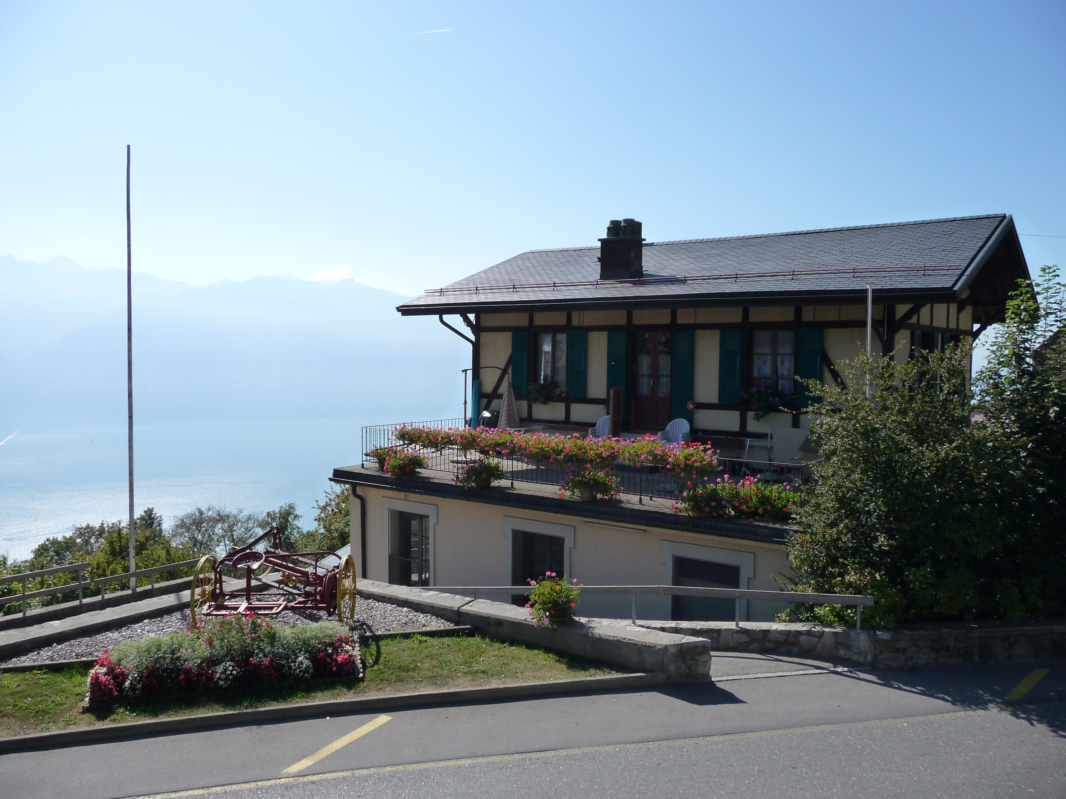 Bahnhof von Chardonne in der Schweiz.